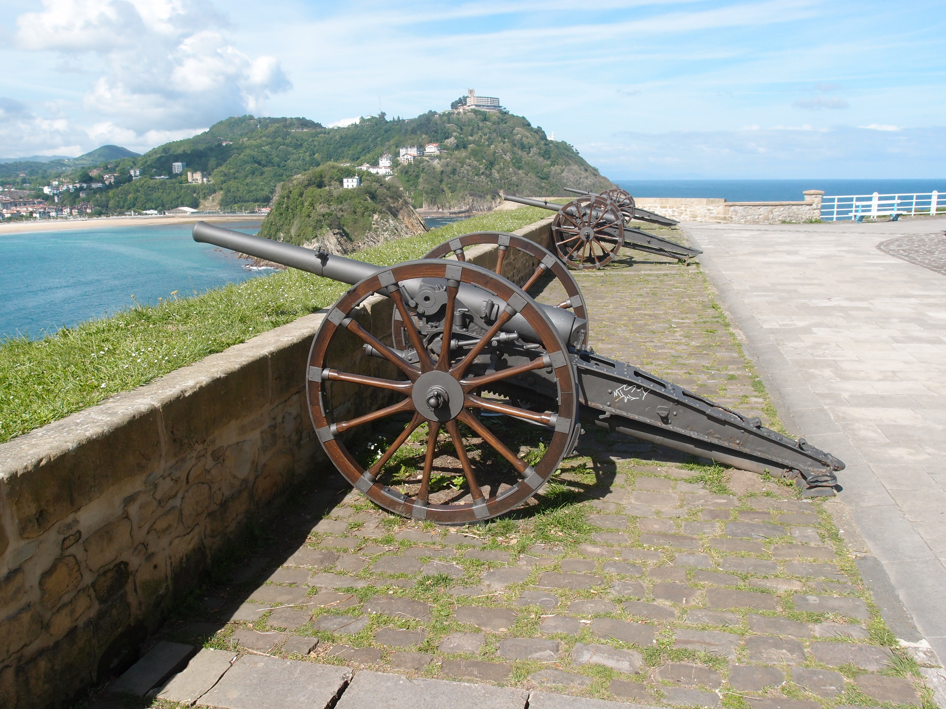 Geschützbatterie auf dem Berg Urgull in Donostia - San Sebastian Datum: 14.05.2014 Urheber: M. Pfeiffer alias Gordito1869 Quelle: Privates Fotoarchiv des Urhebers